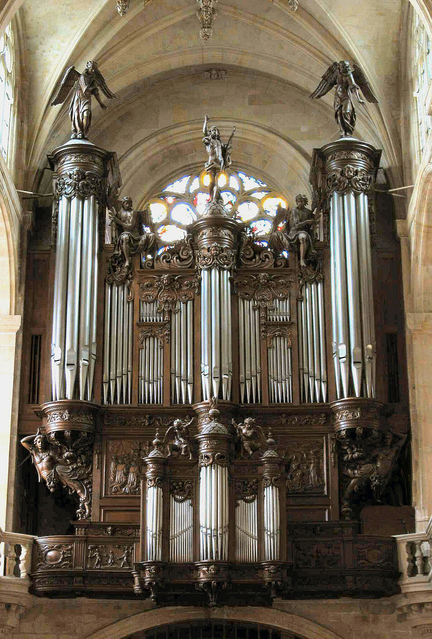 Orgue de l'église Saint-Étienne-du-Mont à Paris